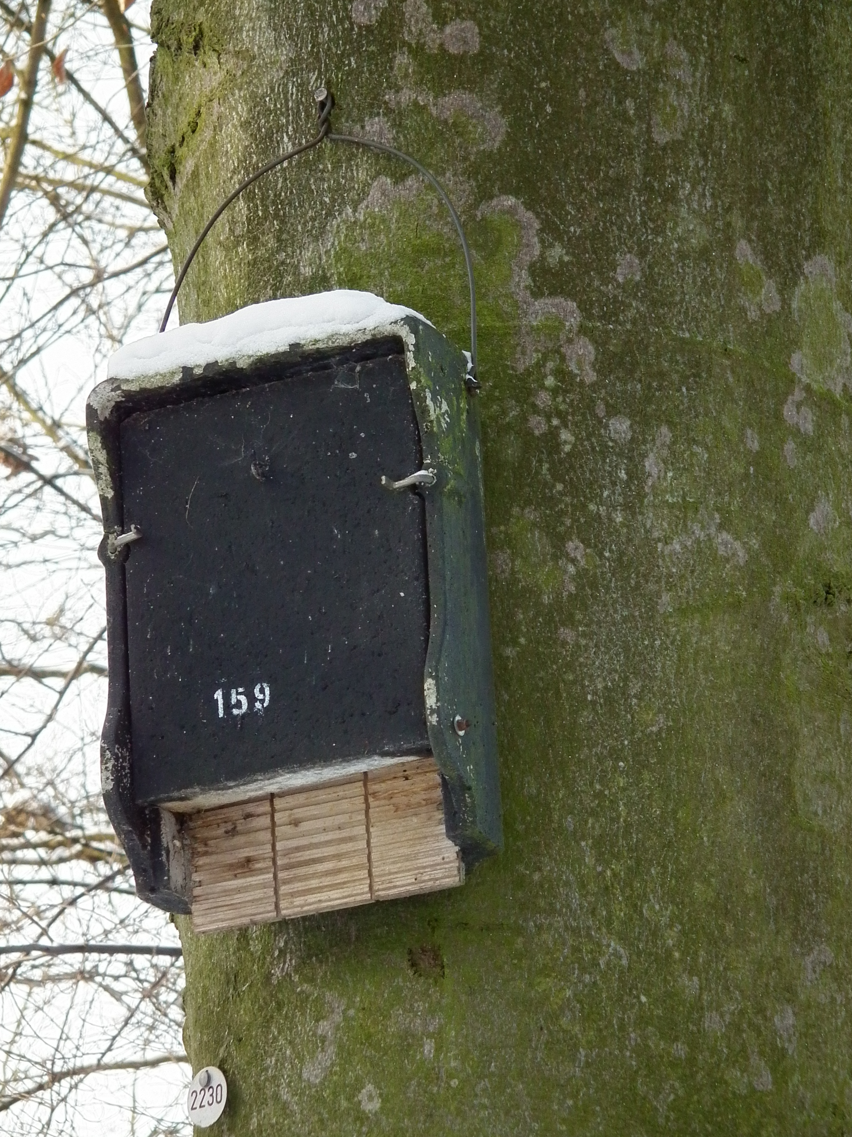 Fledermauskasten, fotografiert in Schwetzingen (Baden-Württemberg, Deutschland)